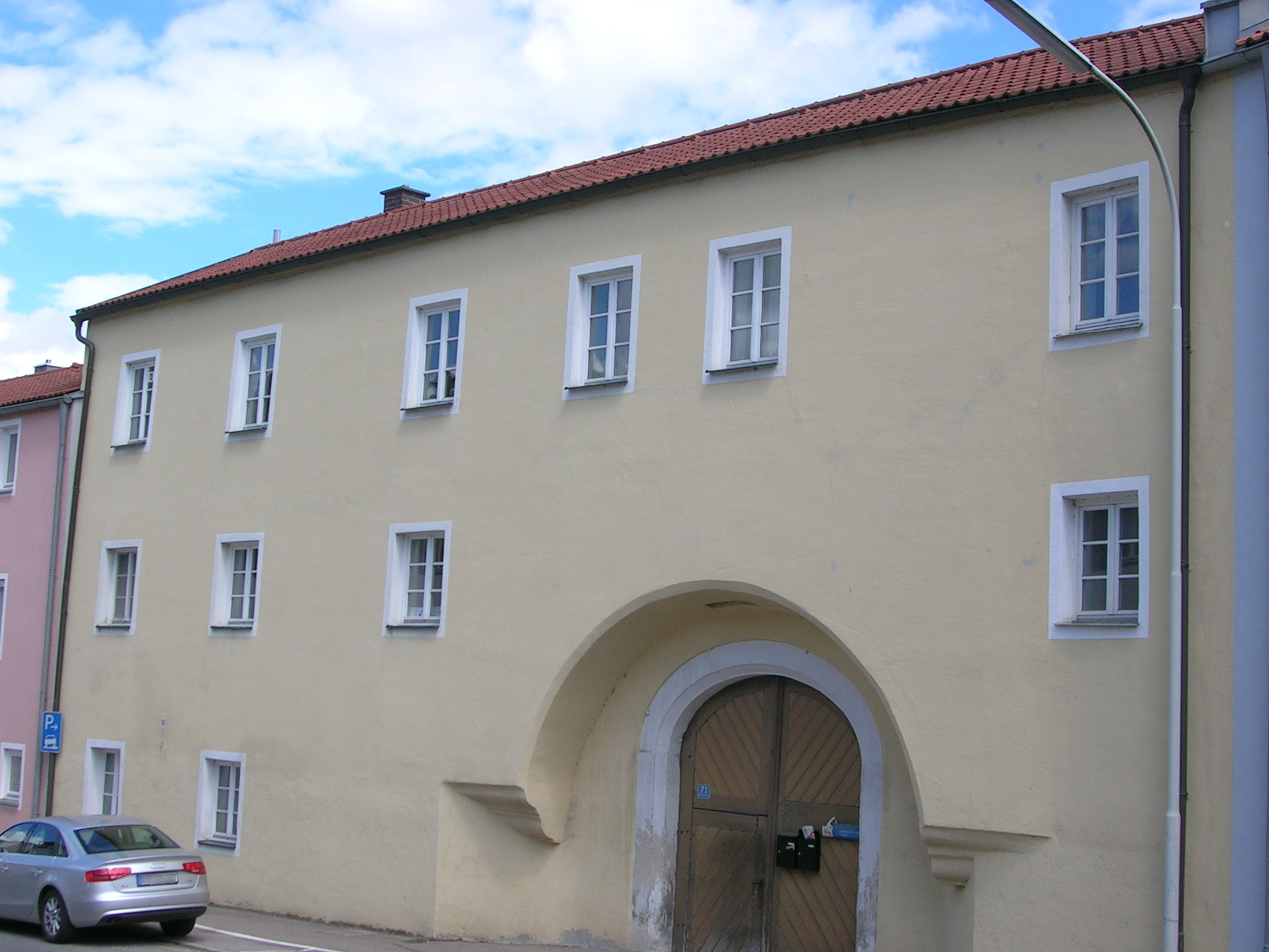 Rebdorfer Straße 71: Ehemaliges Gebäude des Kloster Marienstein